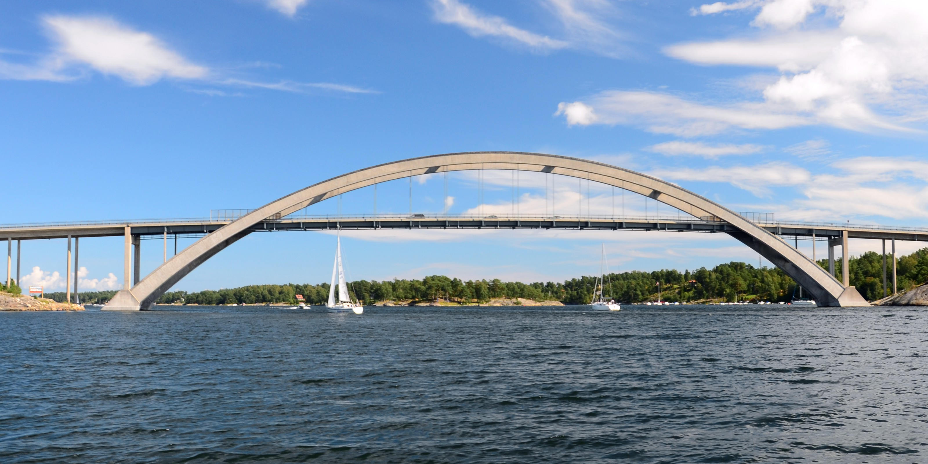 Djuröbron mellan Fågelbrolandet och Djurö i Stockholms skärgård.